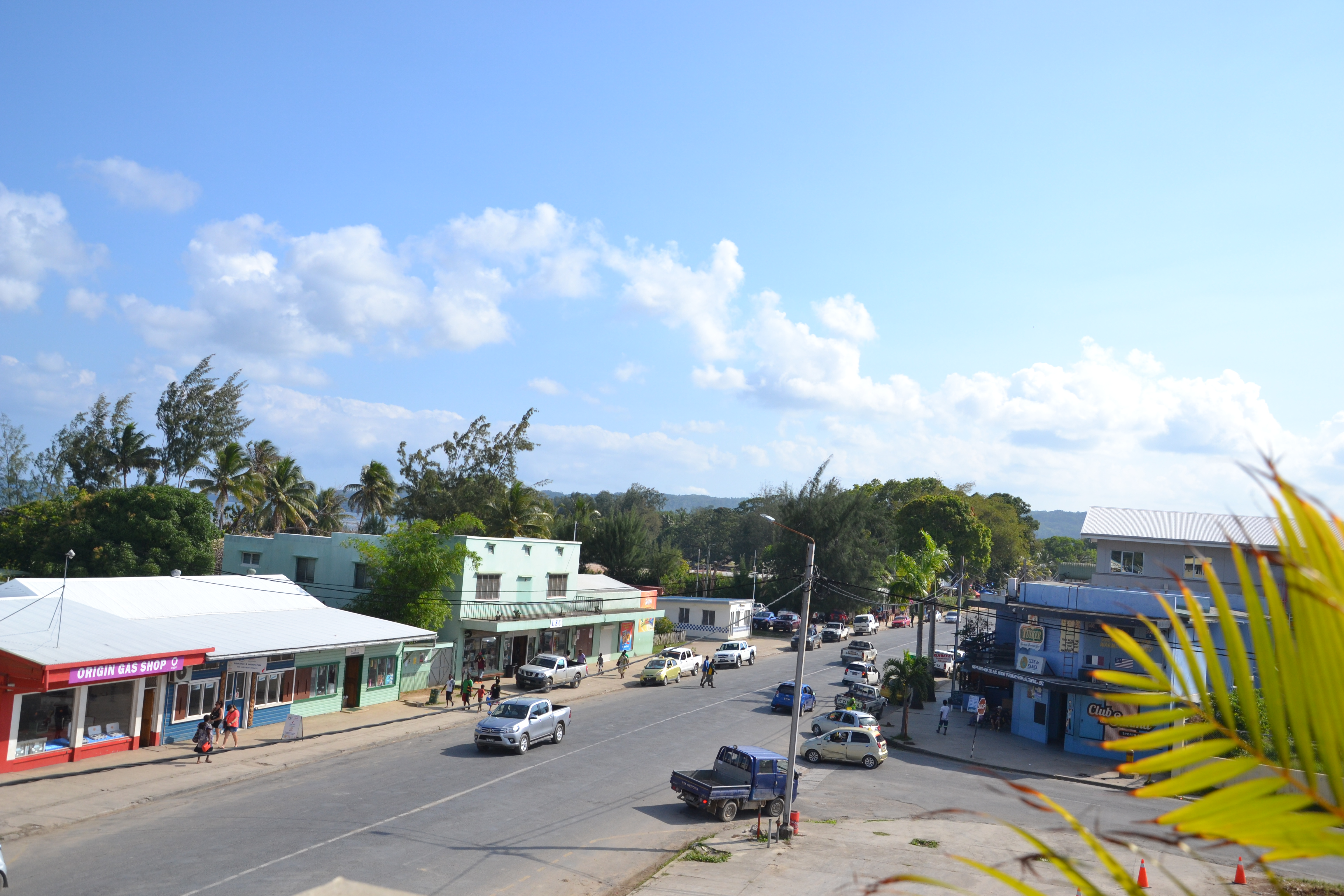 Main Street Luganville